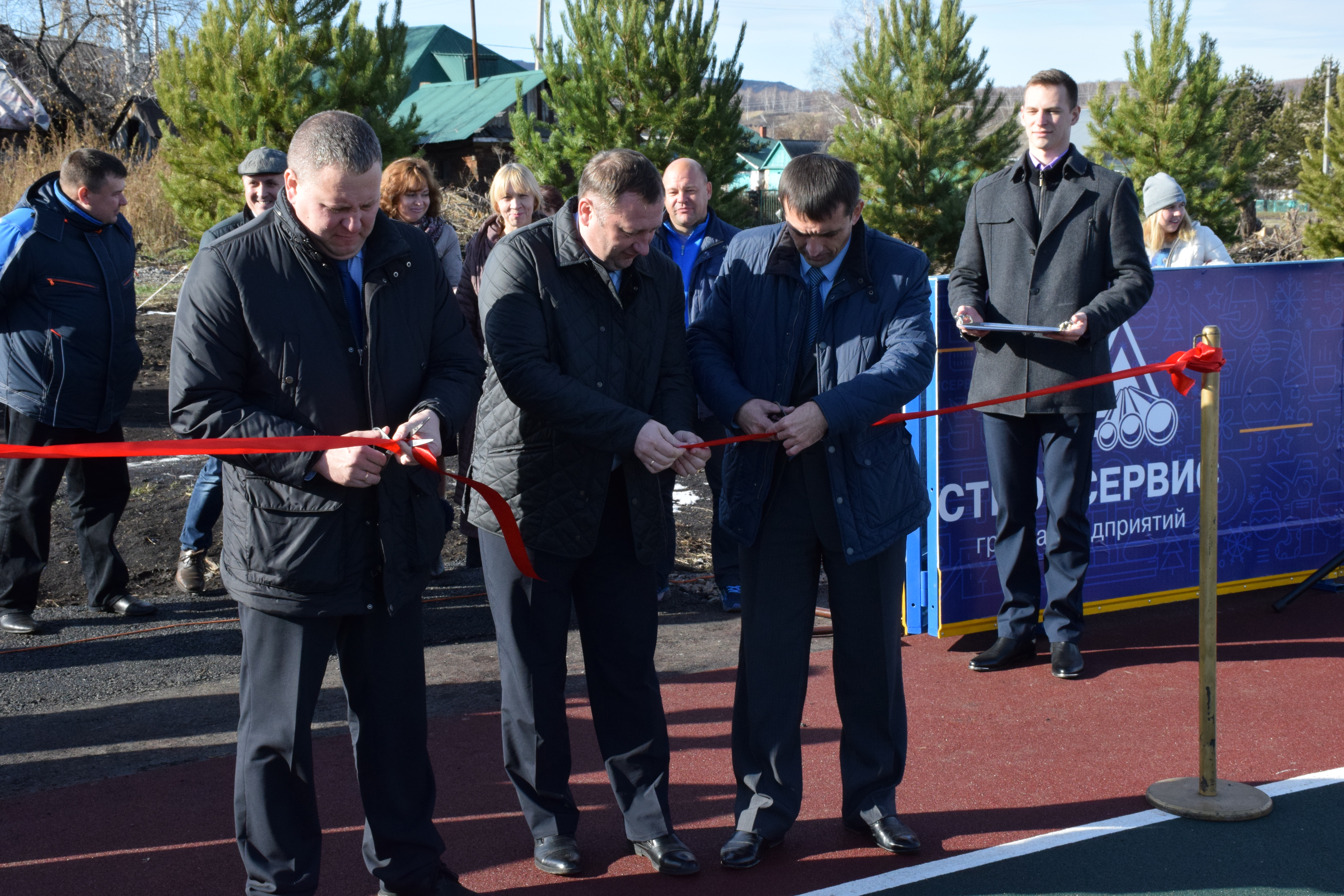 Открытие многофункциональной спортивной площадки в поселке Рассвет Новокузнецкого района.